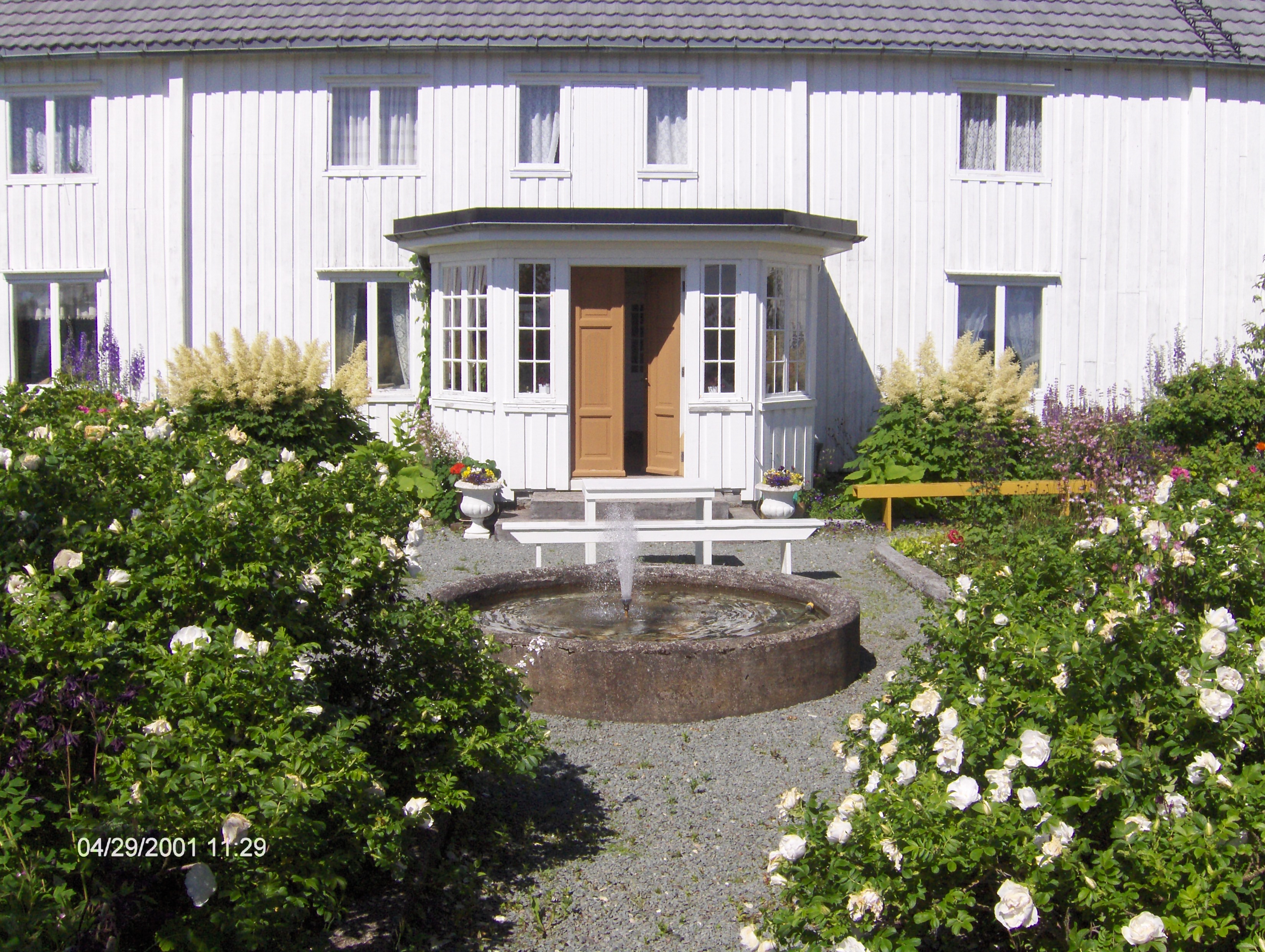 Hovedlåna på Uthaugsgården, et kulturhistorisk museum i Ørland kommune, Trøndelag